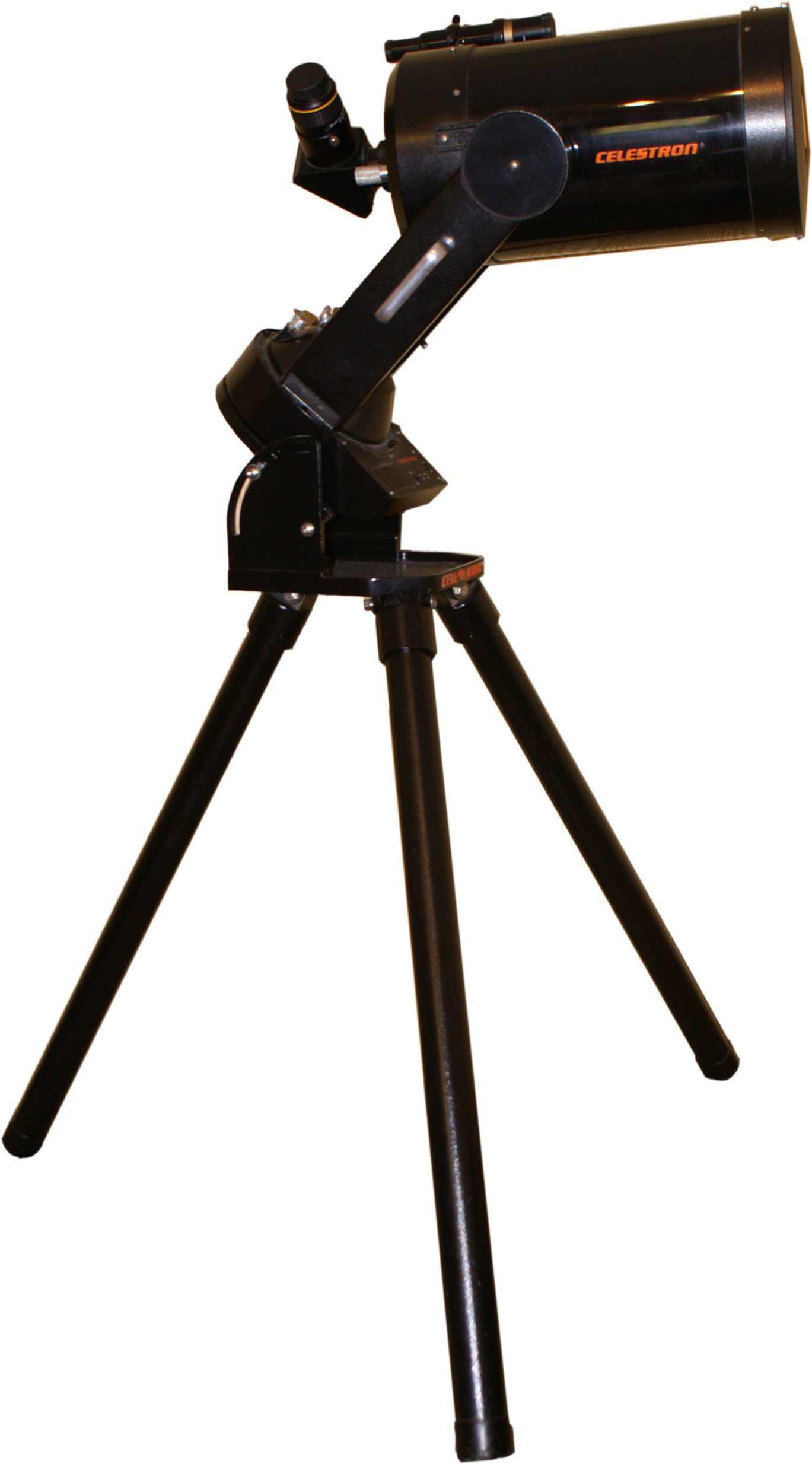 Celestron C8 Teleskop